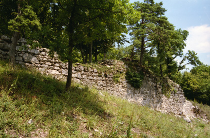 Südmauer der Ruine Frohberg Tschoepperli